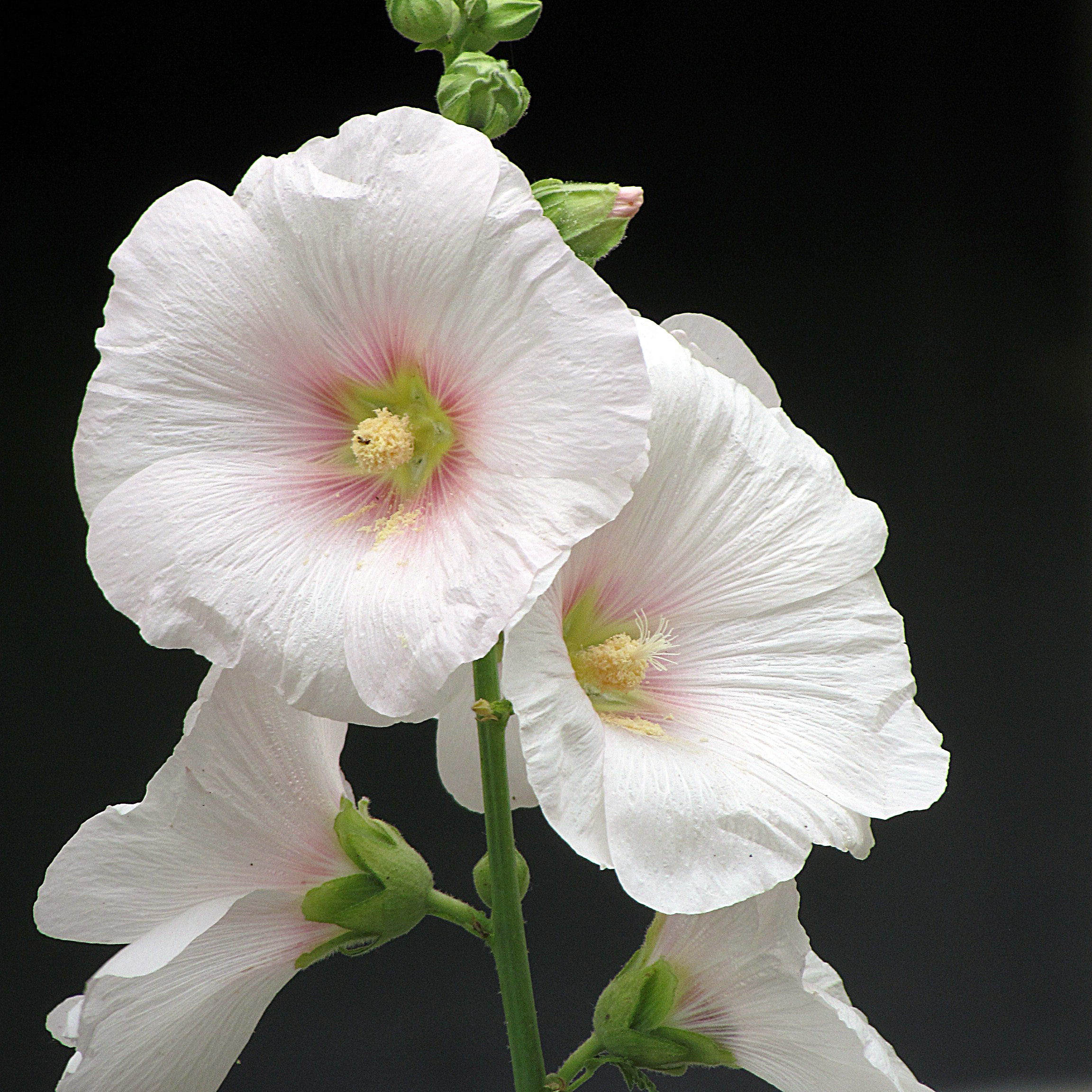 Epicalix of Alcea rosea.